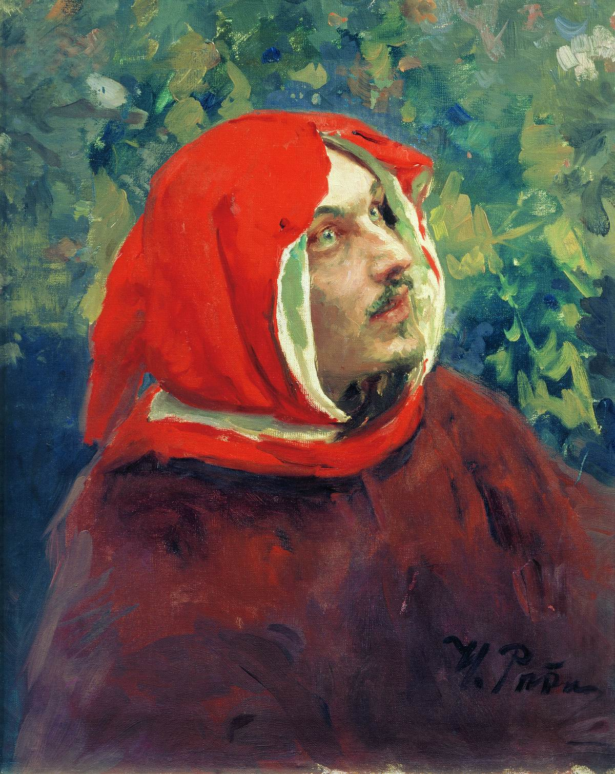 Портрет художника Д. А. Щербиновского, ученика И. Е. Репина